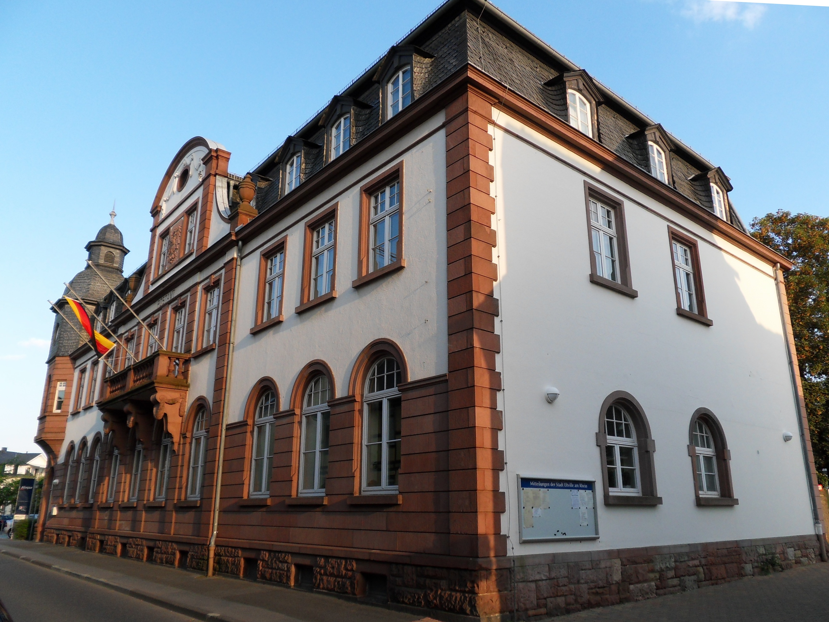 Neues Rathaus in Eltville am Rhein in der Gutenbergstraße (früheres Postamt), Blick von Nordwesten